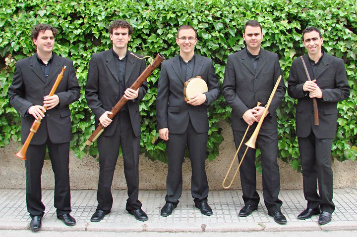 Grupo centrado en el estudio y la interpretación de la música para ministriles